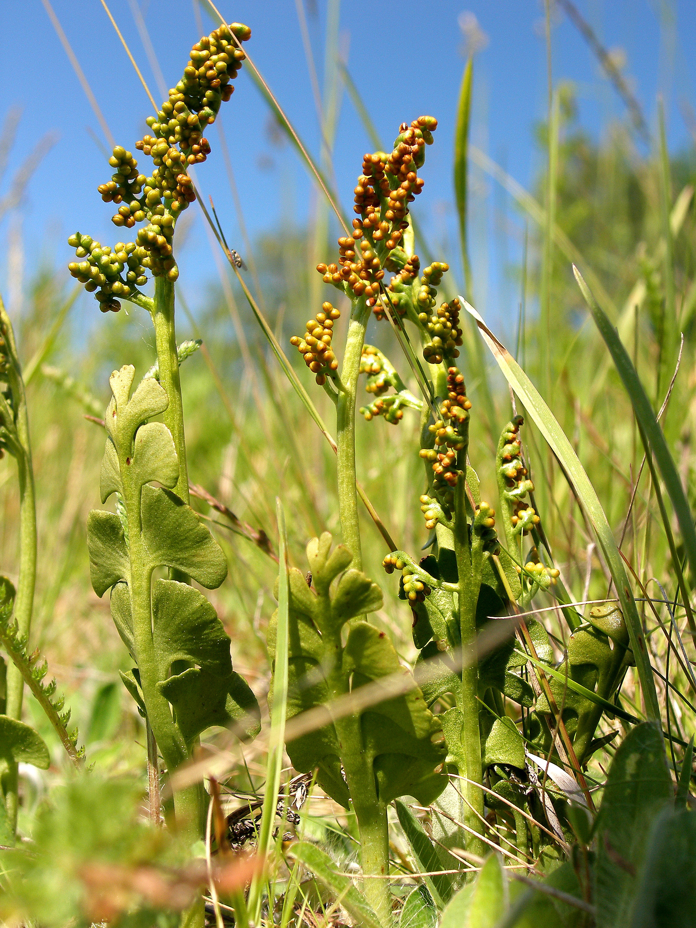 Echte Mondraute (Botrychium lunaria), ein kleines Vorkommen von ca. 40 Pflanzen auf einem Magerrasen zwischen Munster und Wietzendorf auf einem Truppenübungsplatz in Niedersachsen, Lüneburger Heide.